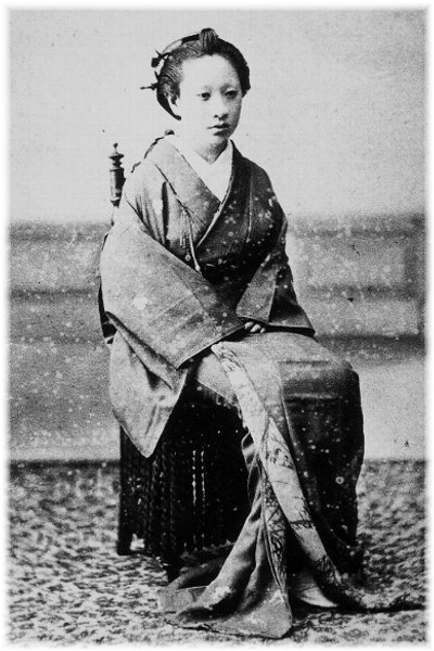 津軽尹子肖像写真